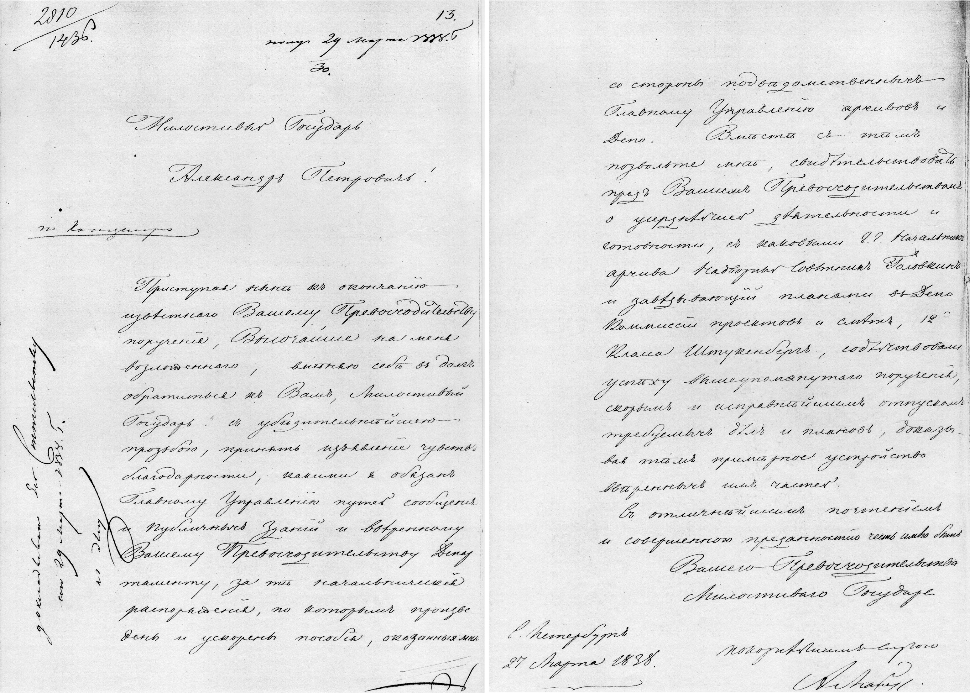 Копия письма А. Л. Майера директору Корпуса Инженеров Департамента Путей Сообщения генерал-лейтенанту А. П. Девяткину